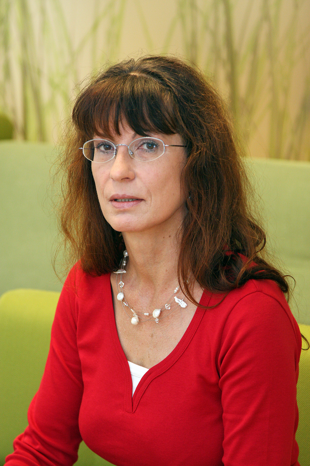 Eva Lachkovics. Wiener Landtagsabgeordnete und Mitglied des Wiener Gemeinderats (Die Grünen)